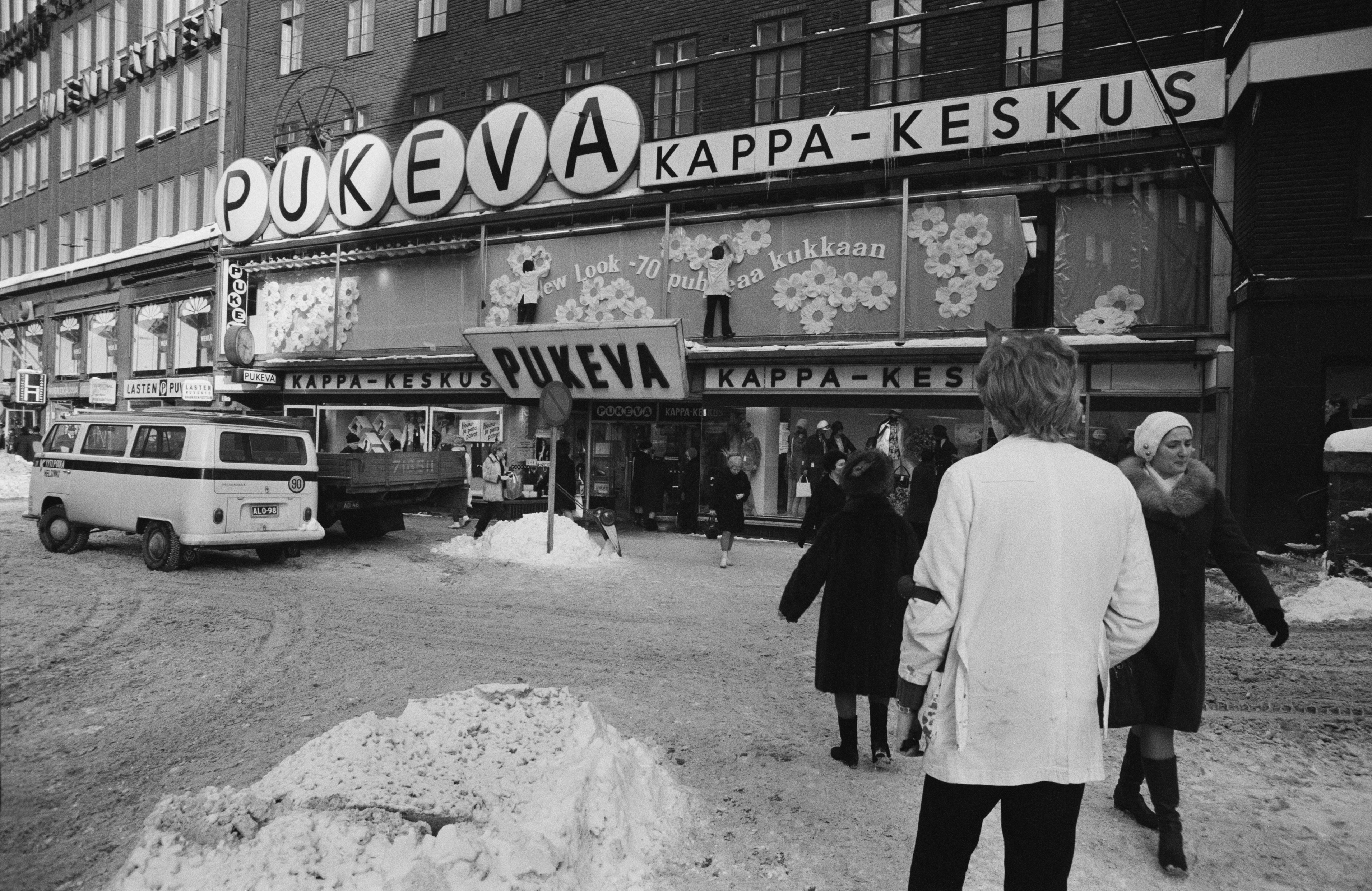 Jalankulkijoita Pukeva Kappa-Keskuksen edustalla lumisella Kaisaniemenkadulla.